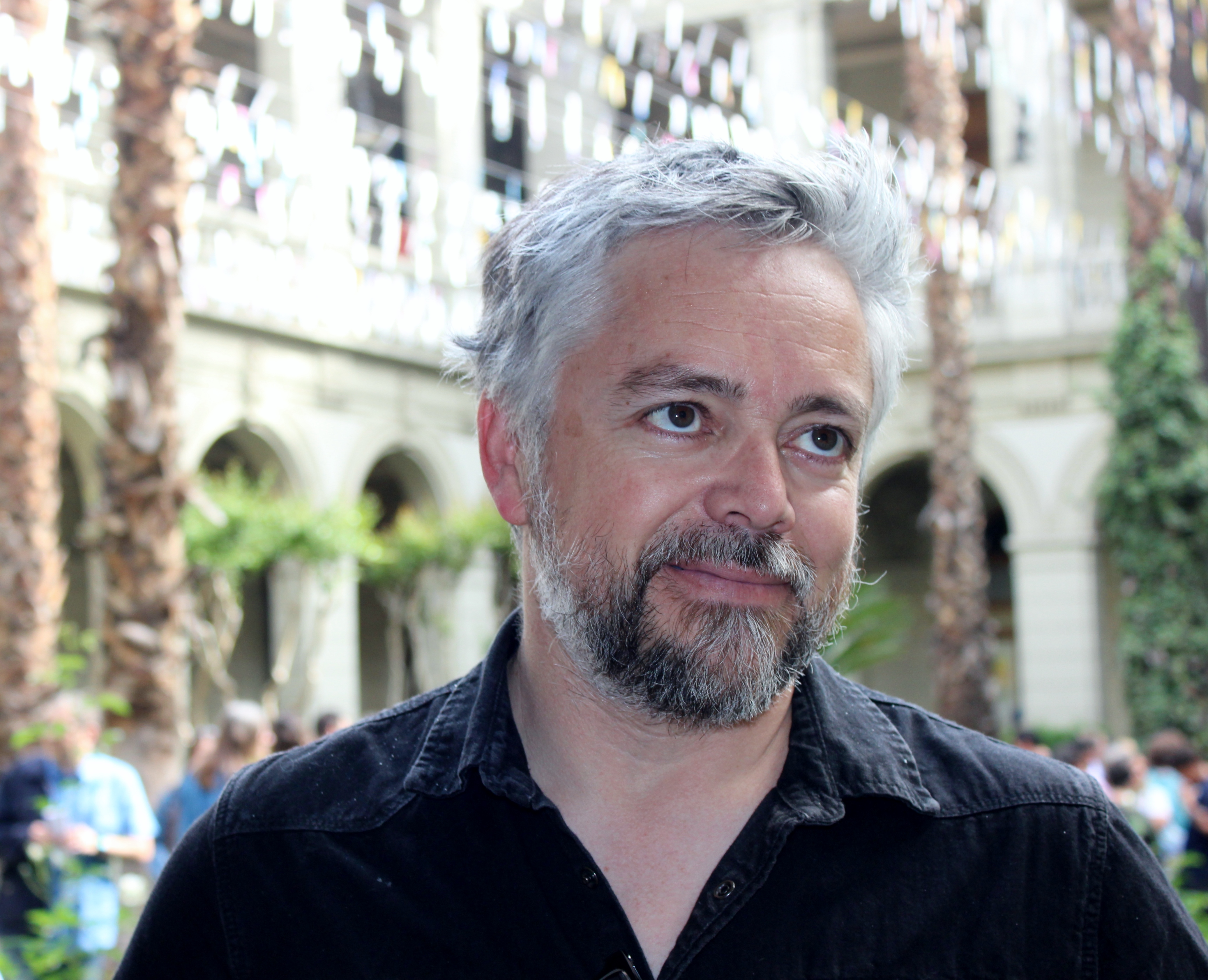 El escritor chileno Jorge Baradit en la Casa Central de la Pontificia Universidad Católica de Chile durante la primera etapa del Festival de Autores de Santiago 2018.